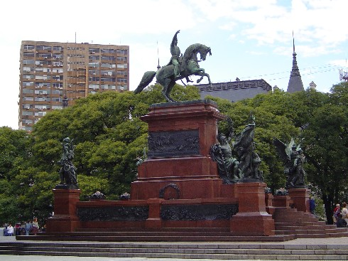 Monumento General San Martín, Buenos Aires (2005-04-09)